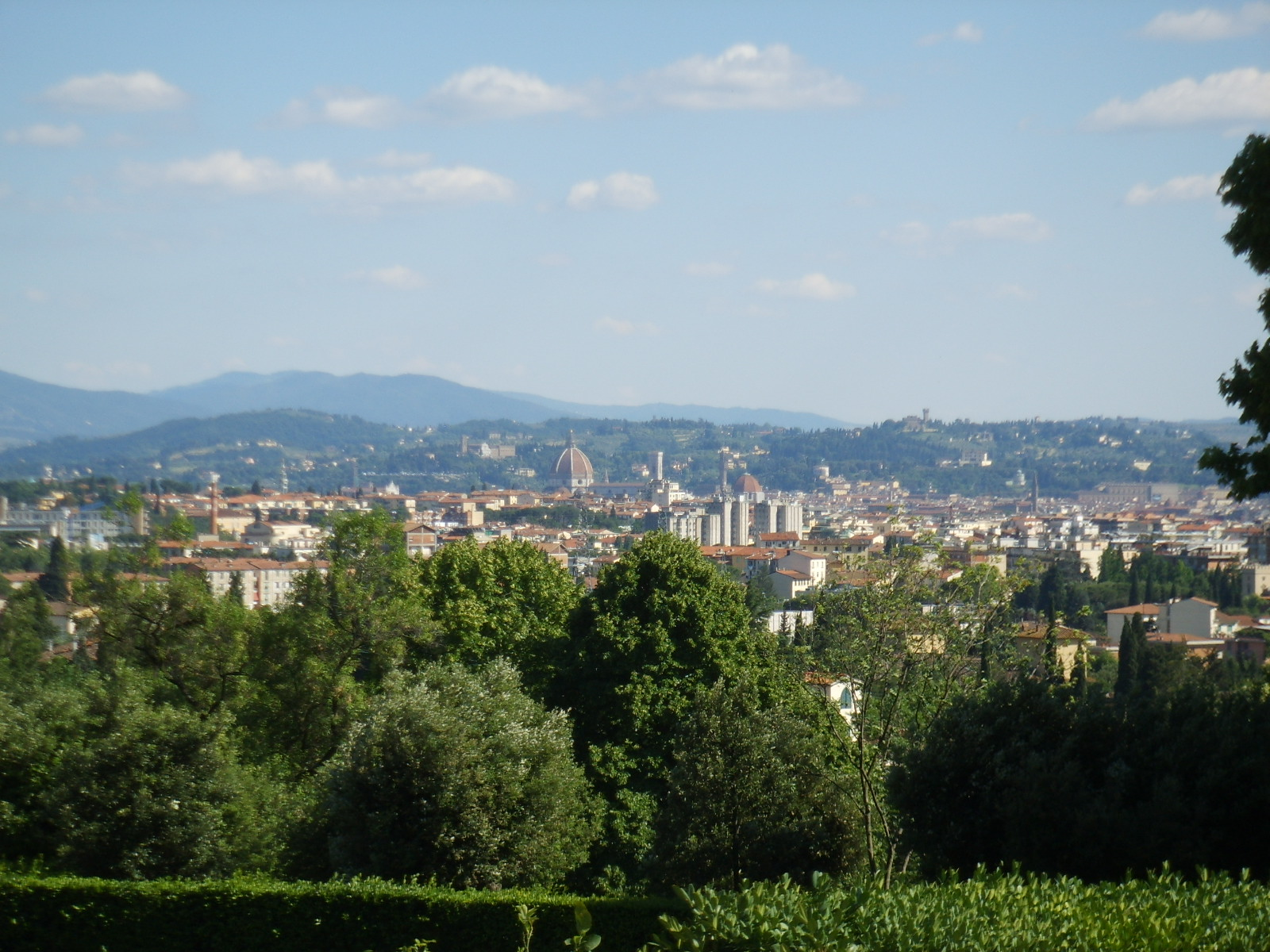 Villa La Petraia, Florence, Italy